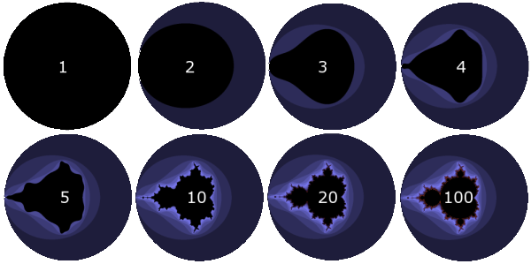 frá 1 upp í 100 iterations af Mandelbrot settinu.